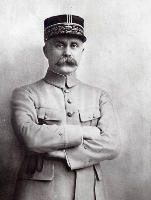 Philippe Pétain photographié par Henri Manuel.